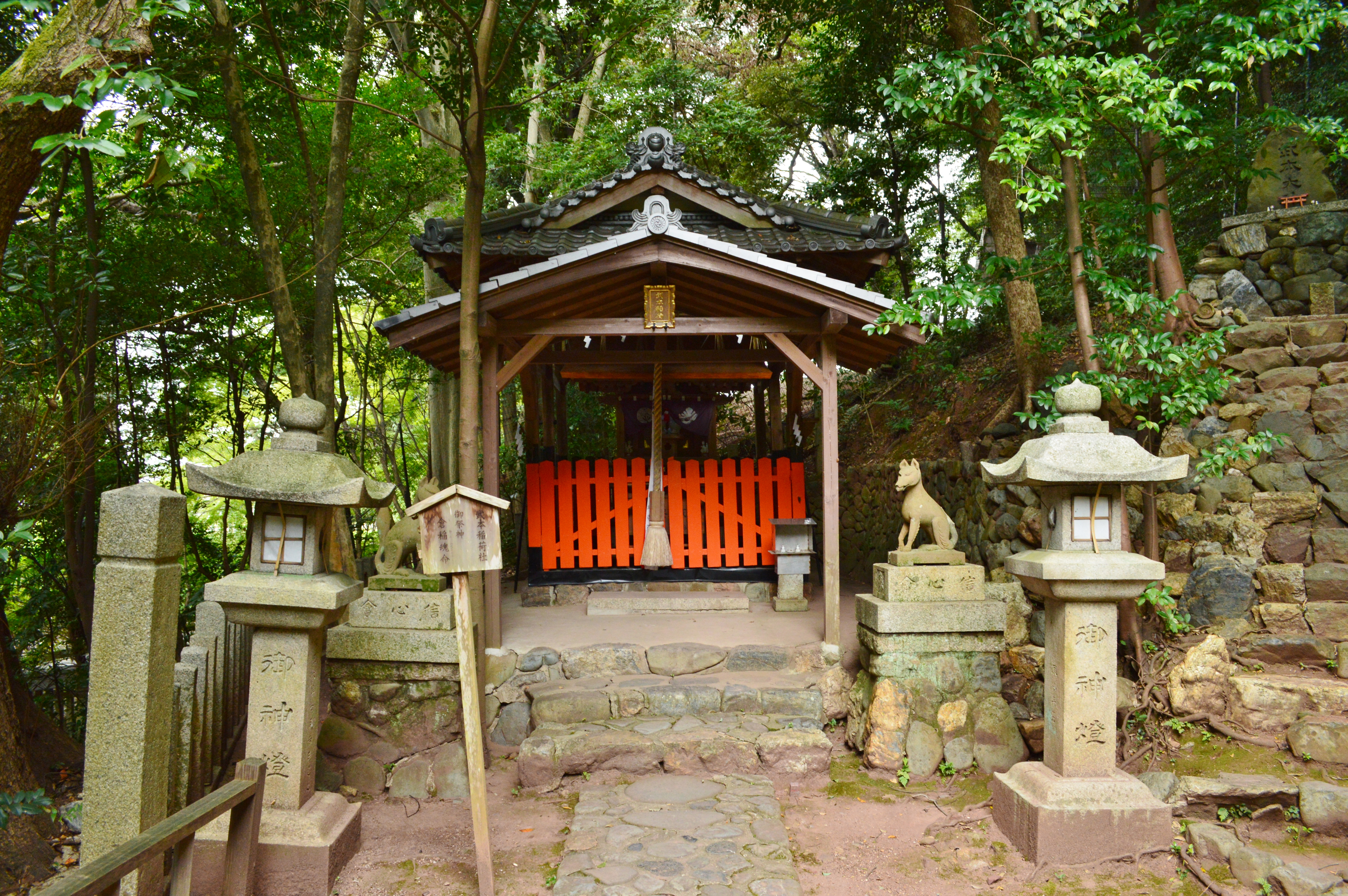 宇治上神社 境内社